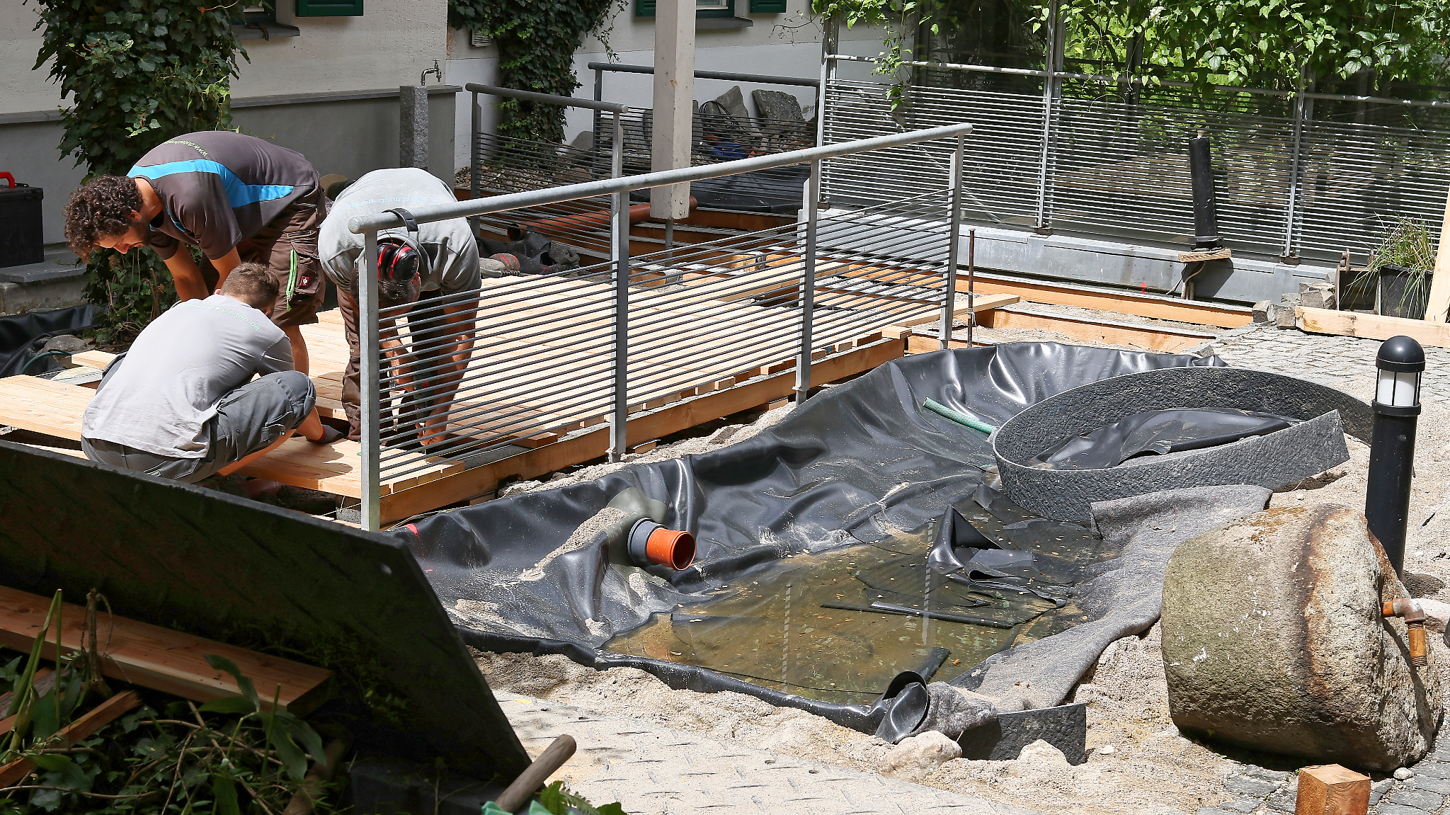 Details mit Landschaftsgärtnern beim Neubau von Teich, Bachlauf und Holzbrücke mit Geländer im Innenhof des Valentinhauses